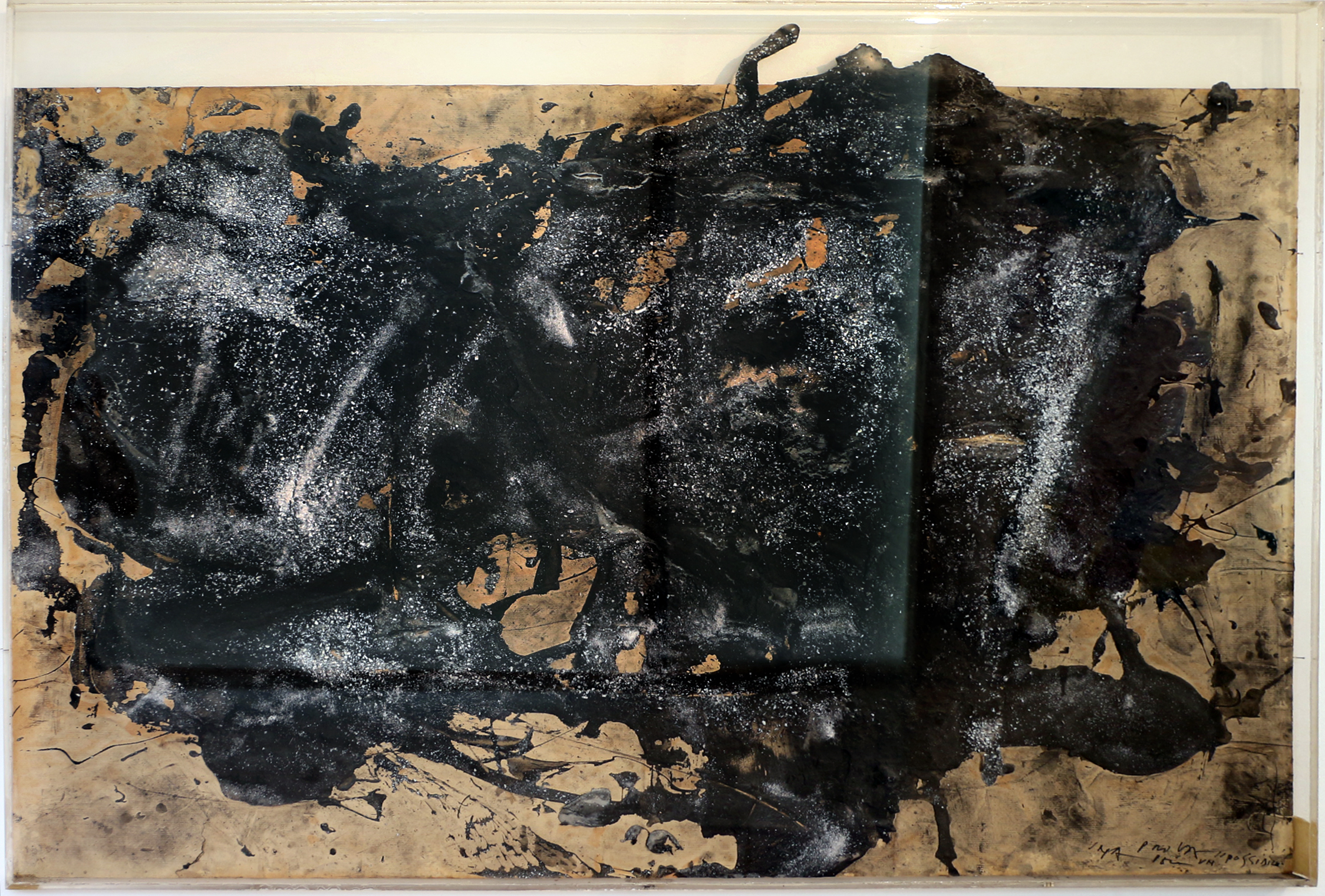 Collezione Mosaici Moderni - NB: Museum explicitly authorized the upload of its contemporary art collection for WLM 2016 (for further info ask WLM Italy organizators). This is a photo of a monument which is part of cultural heritage of Italy.